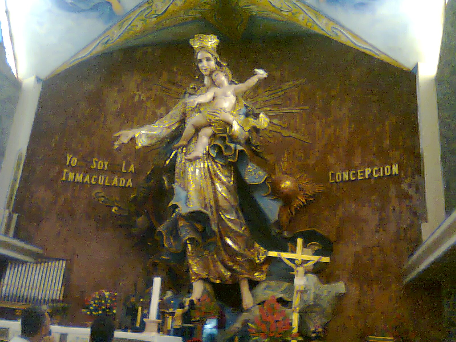 Vista de la Inmaculada Concepcion, La imagen mide 12m de alto tallada totalmente en madera de cedro, con una corona de 1m de alto con incrustaciones de piedras preciosas y bañada en oro